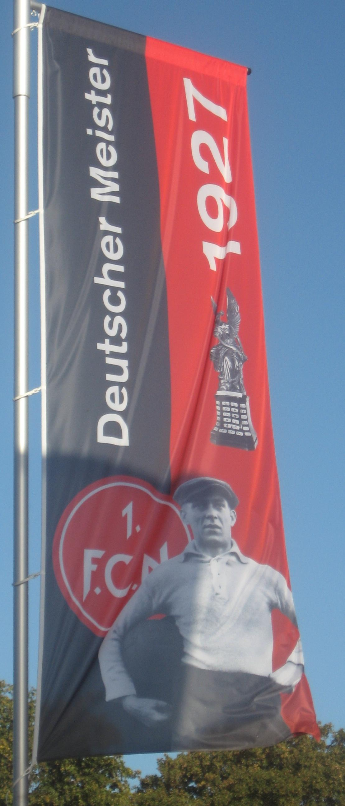 Fahne des 1. FC Nürnberg mit der Jahreszahl des Gewinnes der Deutschen Meisterschaft.